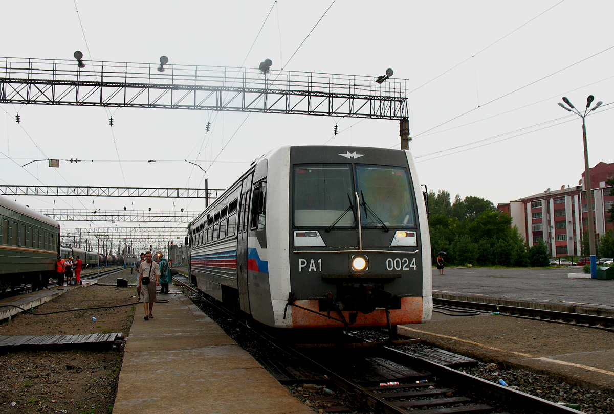 Автомотриса РА1-0024 Россия, Амурская область, станция Белогорск